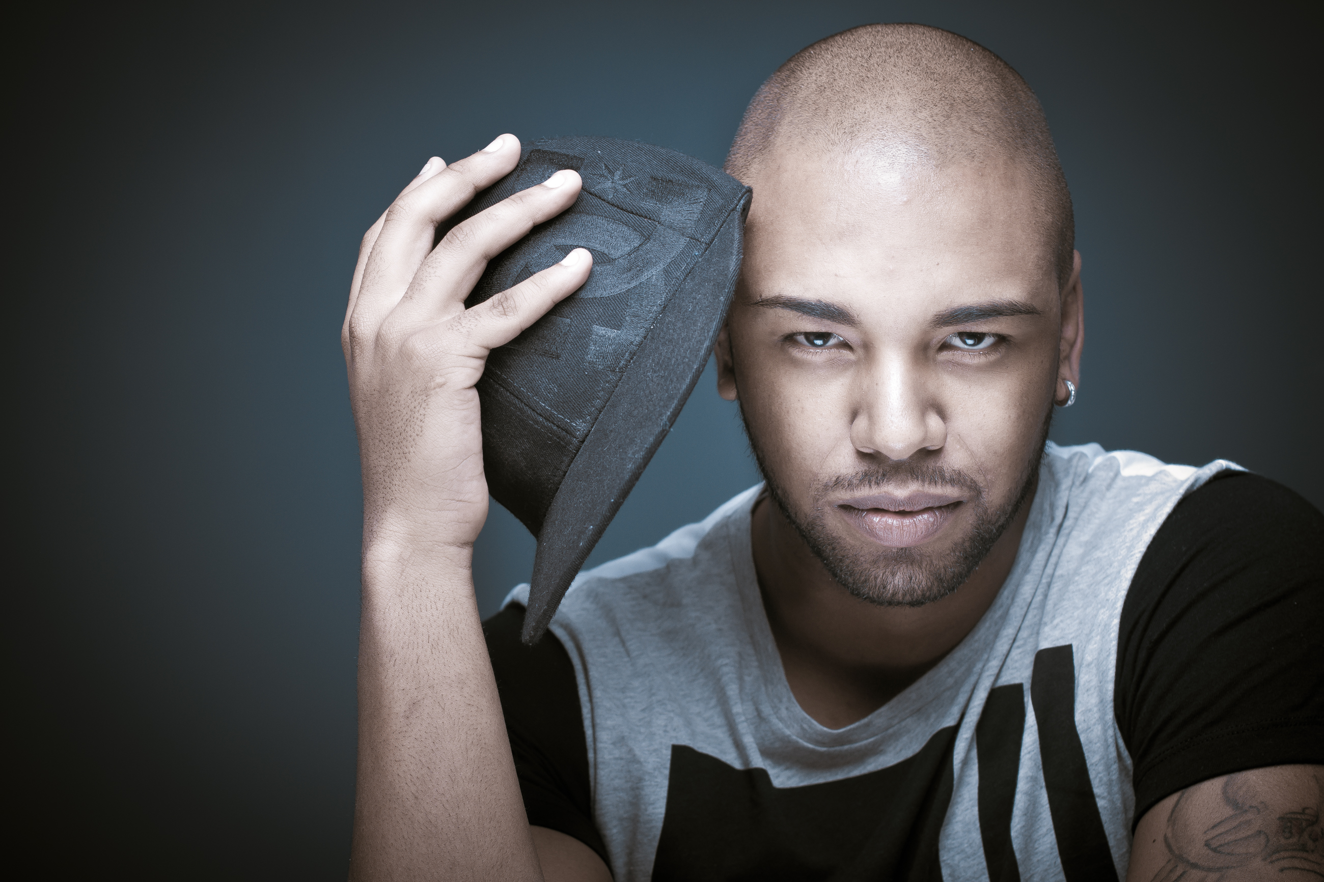 Peter Pou